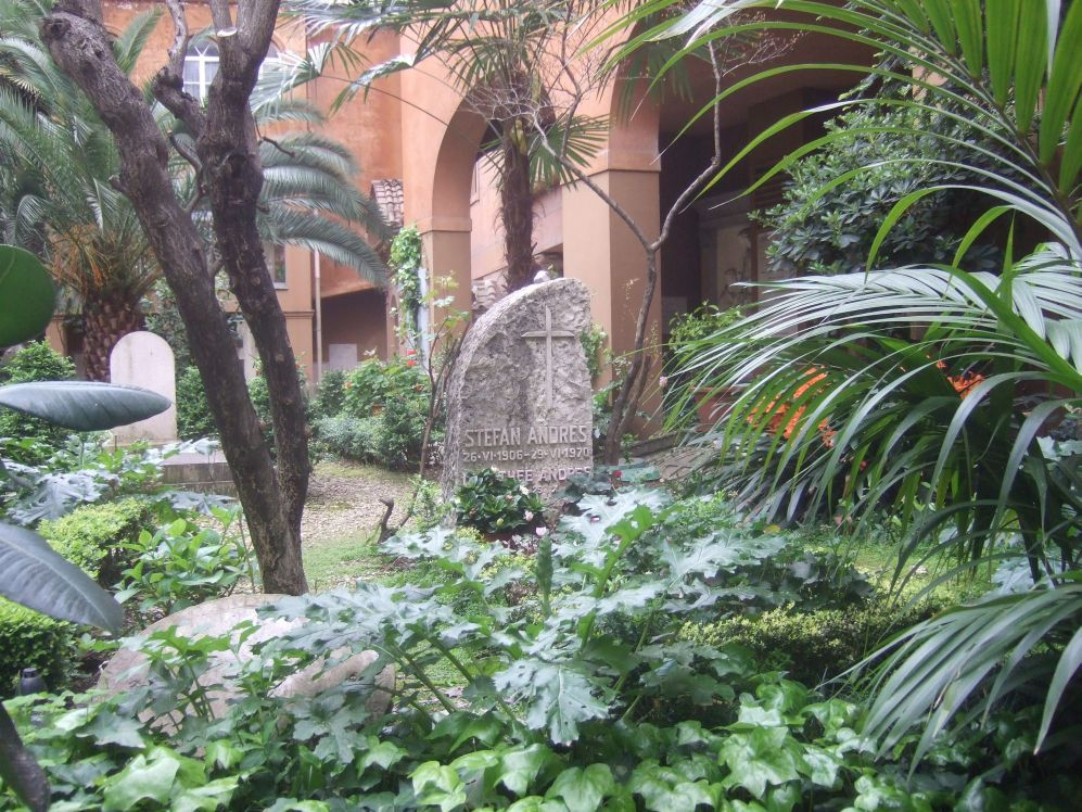 Campo Santo Teutonico, Roma